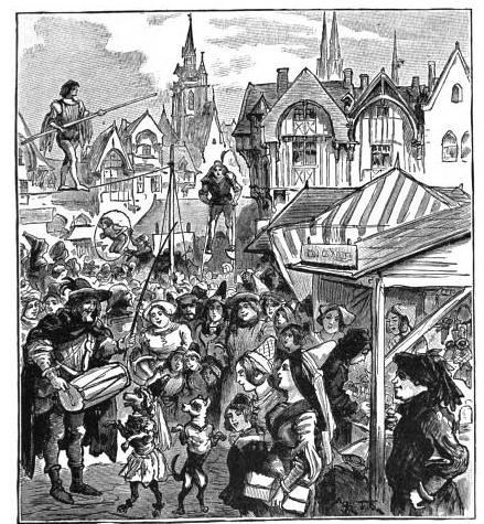 Illustration tirée de Histoire de France, cours élémentaire, Ernest Lavisse, Armand Colin, 1913, page 45 de l'éditon Heath de 1919.